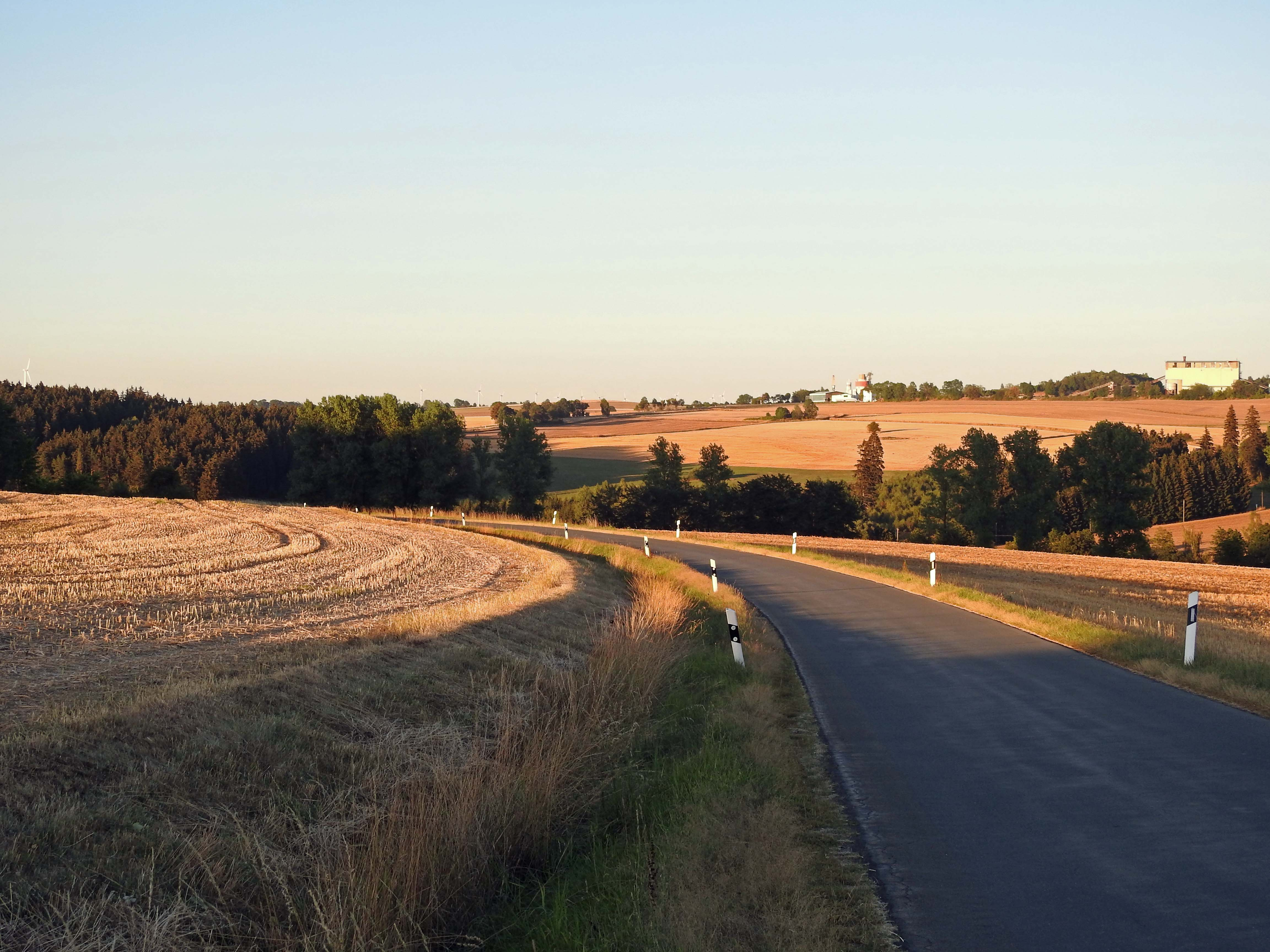 Bei Reitzenstein, Issigau